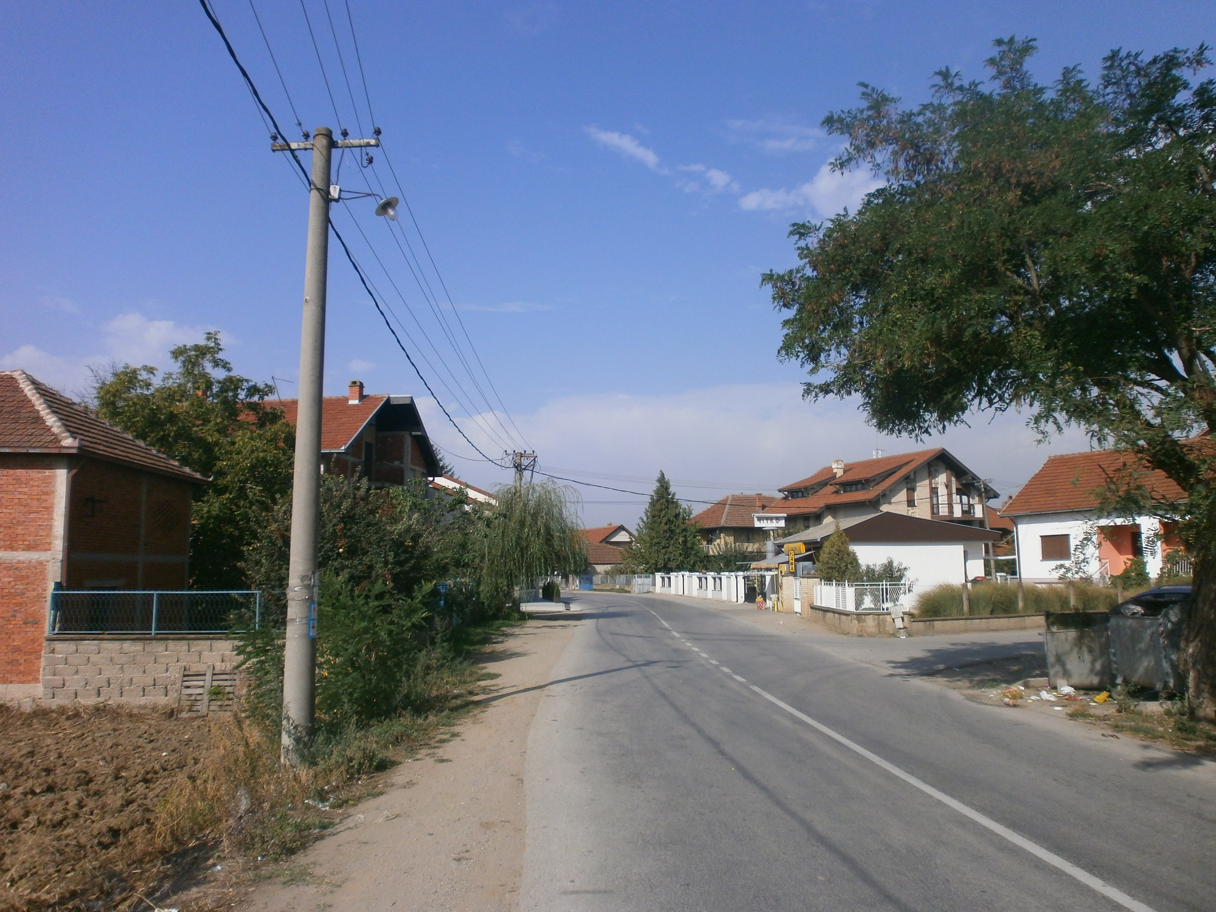 Srpski (latinica): Manojlovce, Leskovac